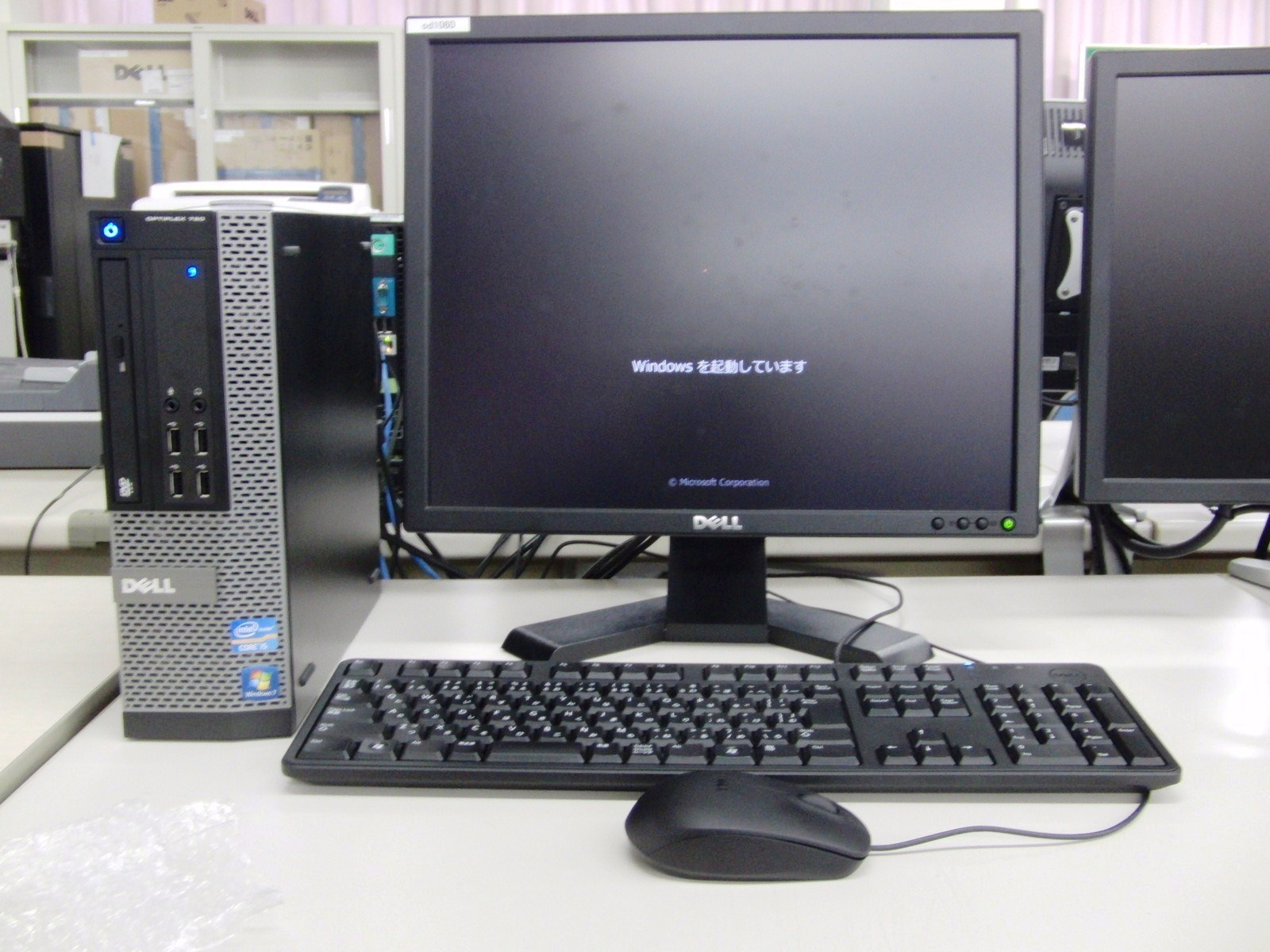 Dell OPTIPLEX 790 を撮影